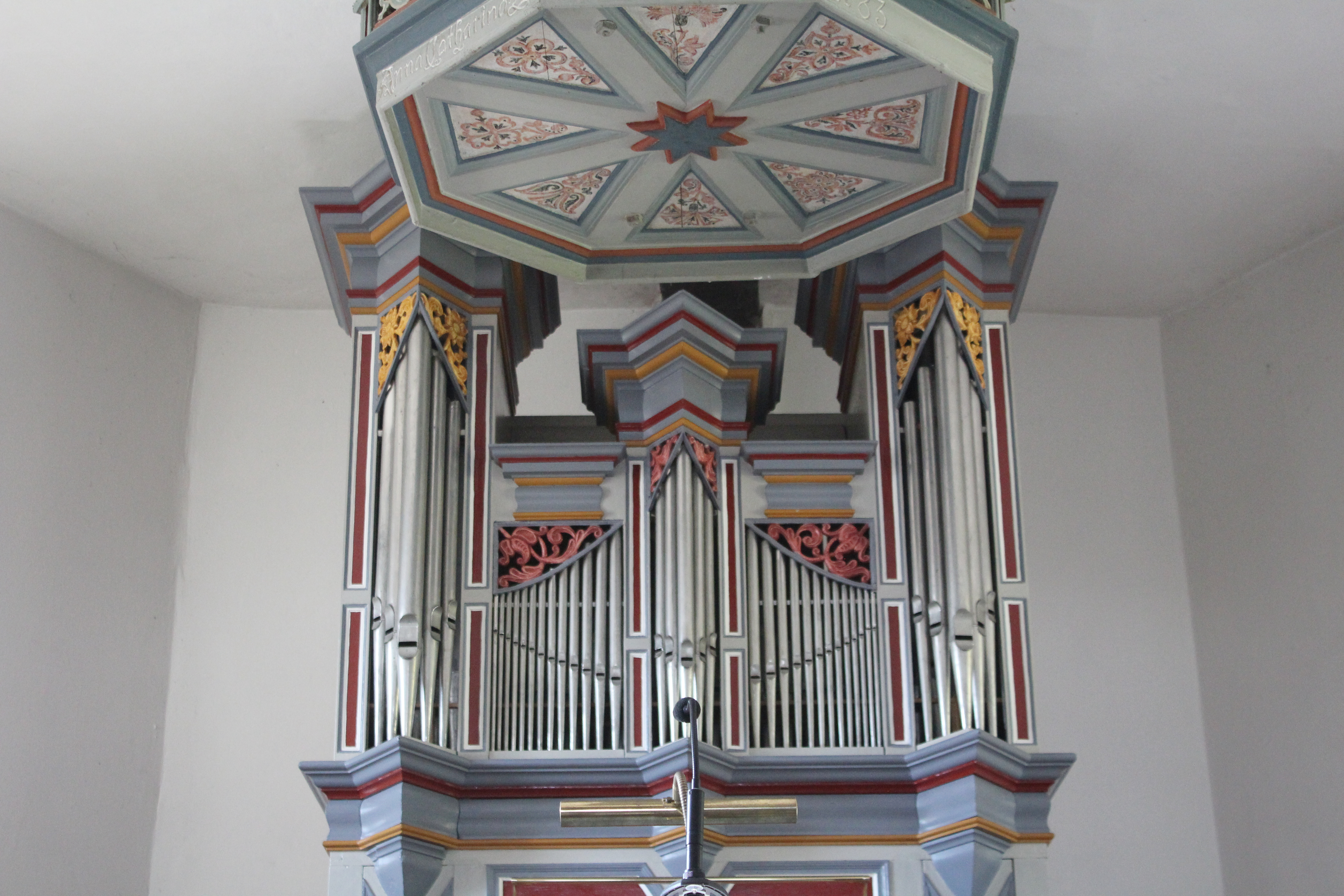 Ev. Kapelle Steinbrücken, Gemeinde Dietzhölztal, Hessen, Deutschland